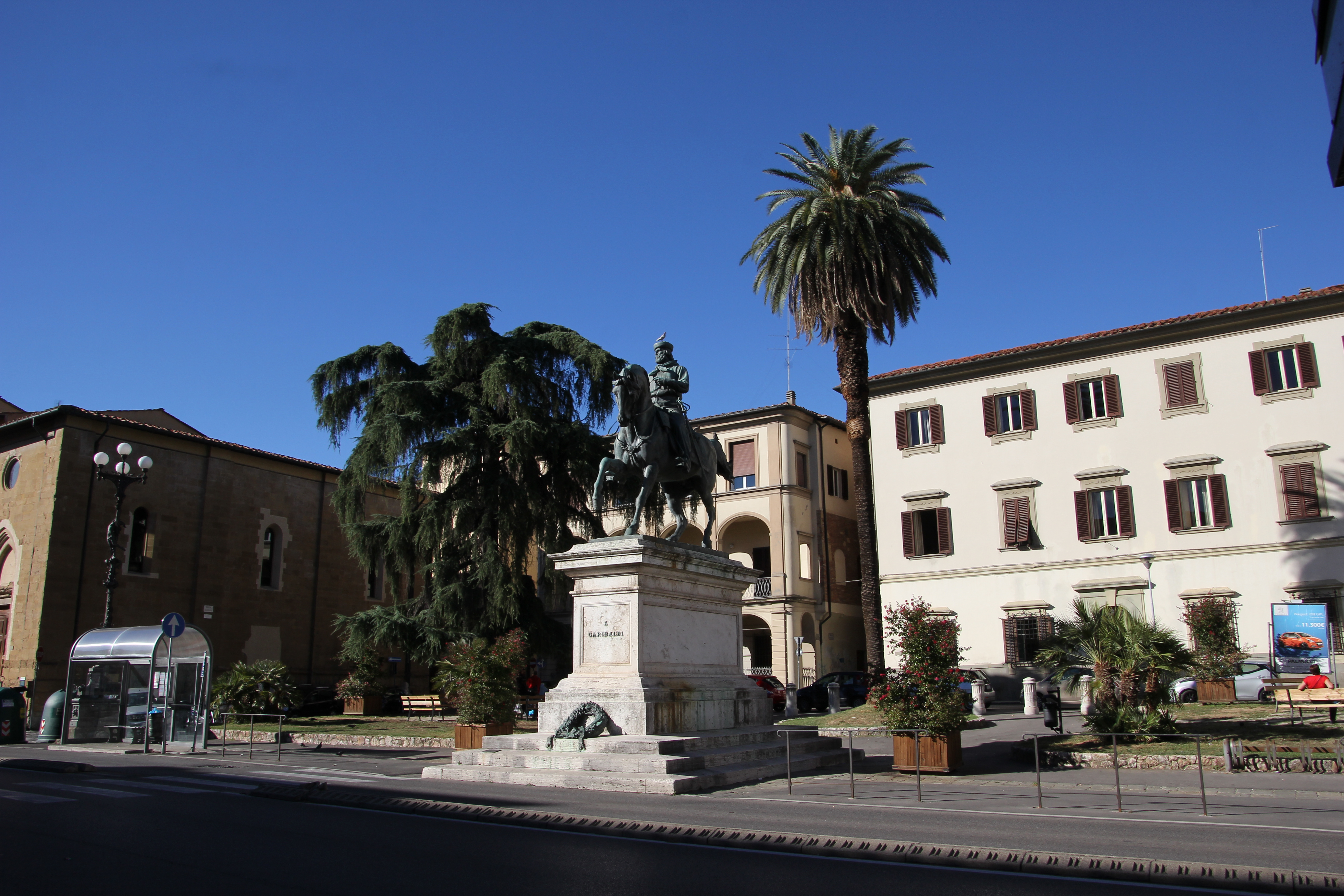 Pistoia, monumento equestre a Giuseppe Garibaldi